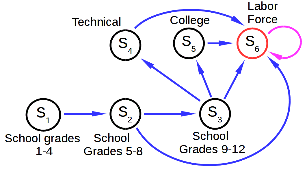 Graph für das Durchlaufen eines exemplarischen einfachen Ausbildungssystems, Gesamtzahl der Zustände: 6.